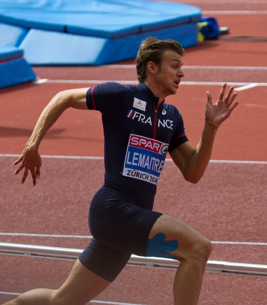 677 christophe lemaitre 200m